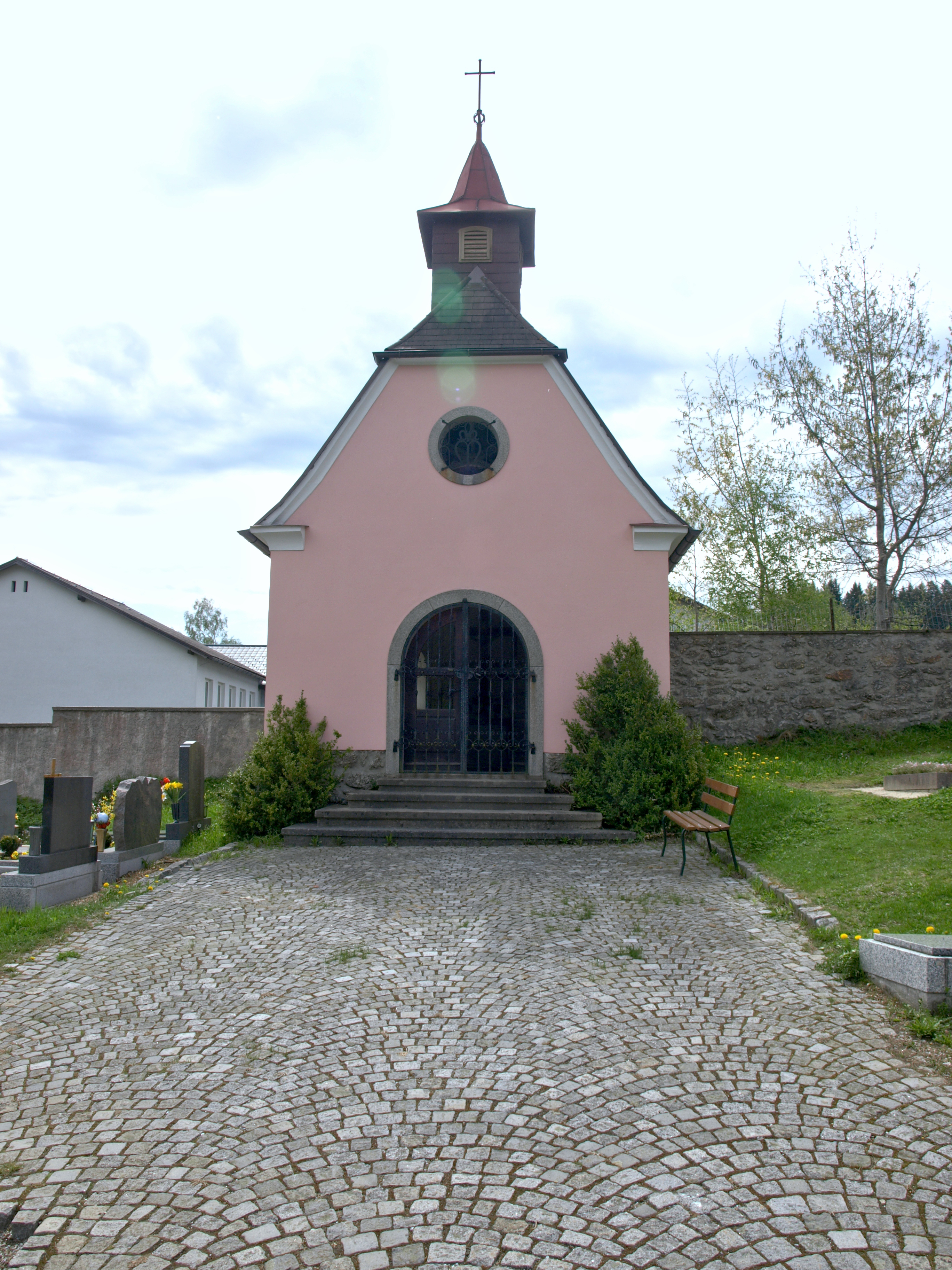 Friedhofskapelle